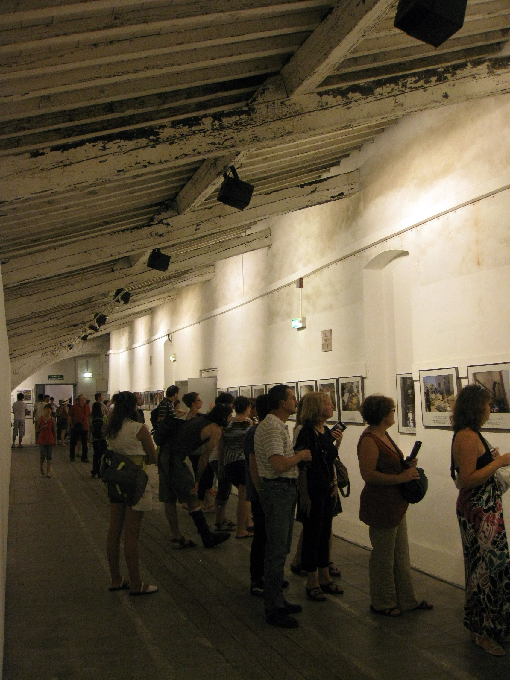 Convent dels Mínims (Perpinyà), la galeria superior del claustre durant la celebració del certamen de fotoperiodisme Visa pour l'Image .